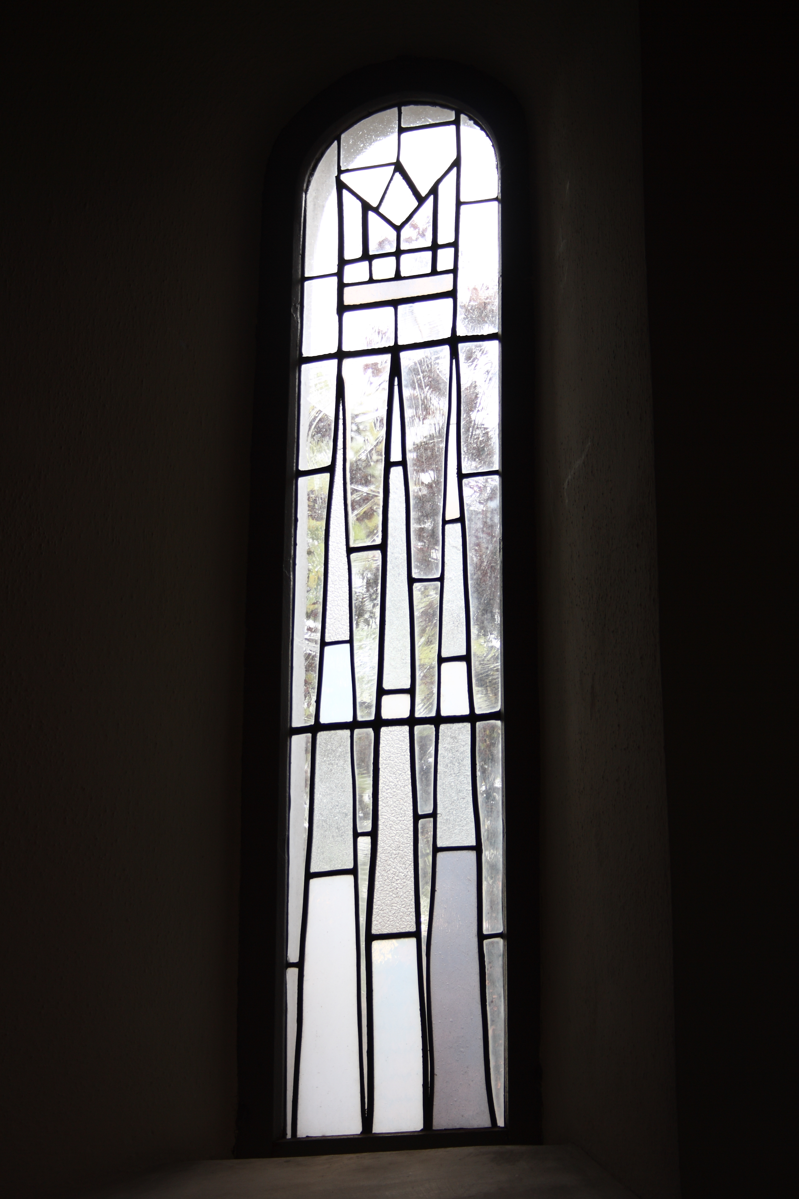 Evangelische Pfarrkirche St.Margaretha in Forheim, einer Gemeinde im Landkreis Donau-Ries (Bayern), modernes Bleiglasfenster